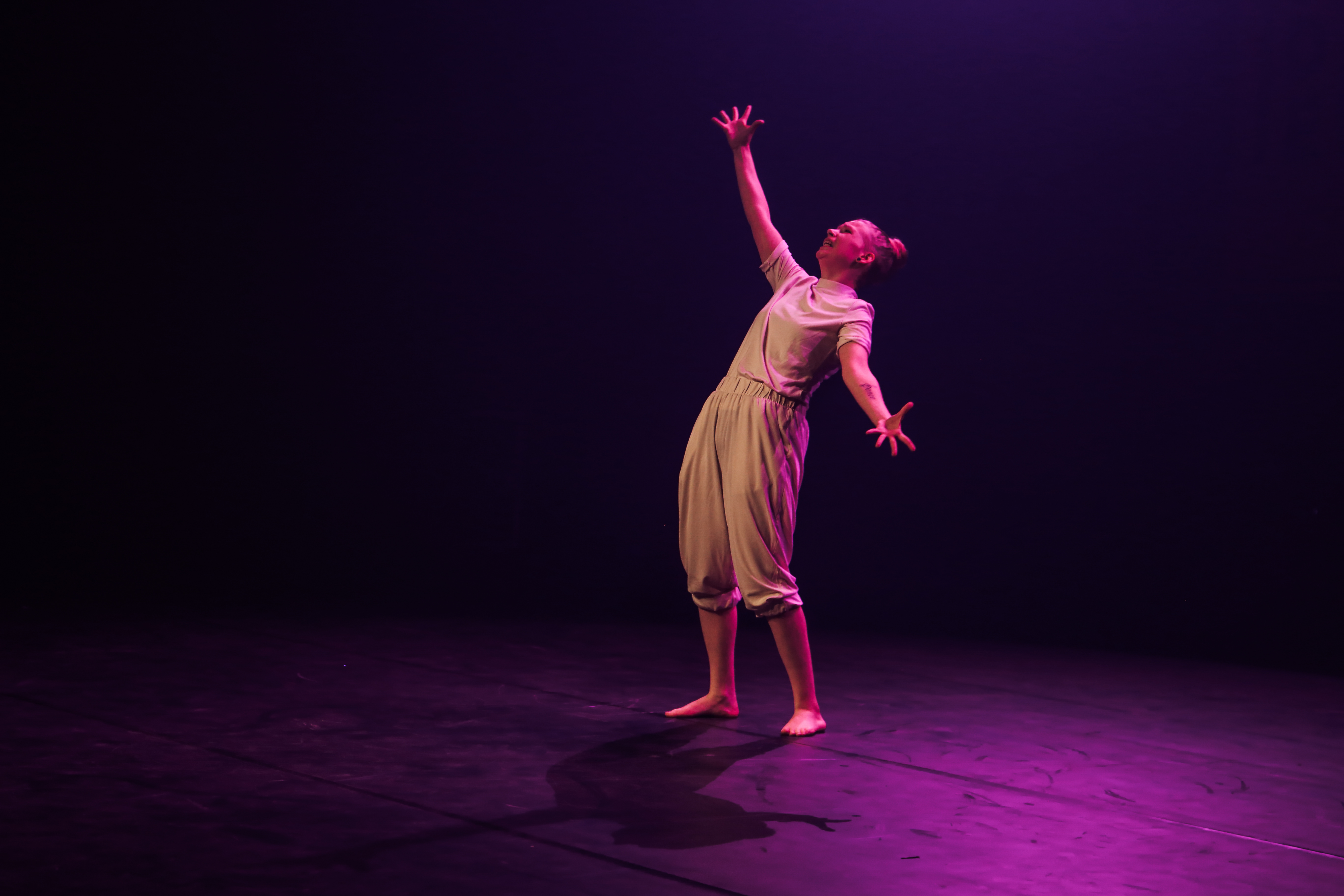 Een deelneemster tijdens de Voorronde Kunstbende Drenthe 2017